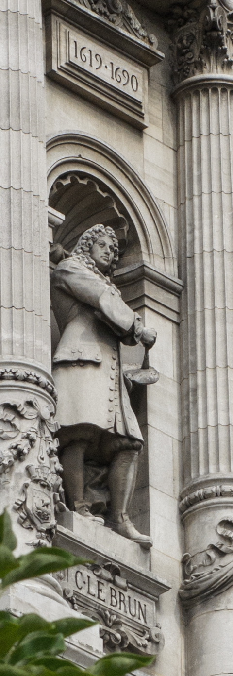 Statue de Charles Lebrun par Jules Renaudot, installée sur une des façades de l'hôtel de ville de Paris.